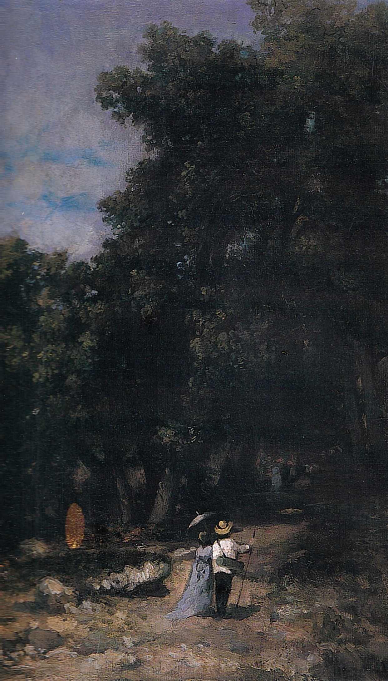 În pădurea de la Fontainebleau, ulei pe pânză, 33x23,5cm, semnat dreapta jos cu roșu: Grigorescu - Muzeul Colecțiilor de Artă din București, astăzi la Muzeul Zambaccian din București.